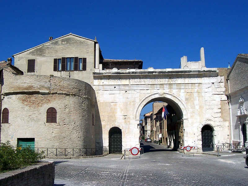 Fano - Arco di Augusto